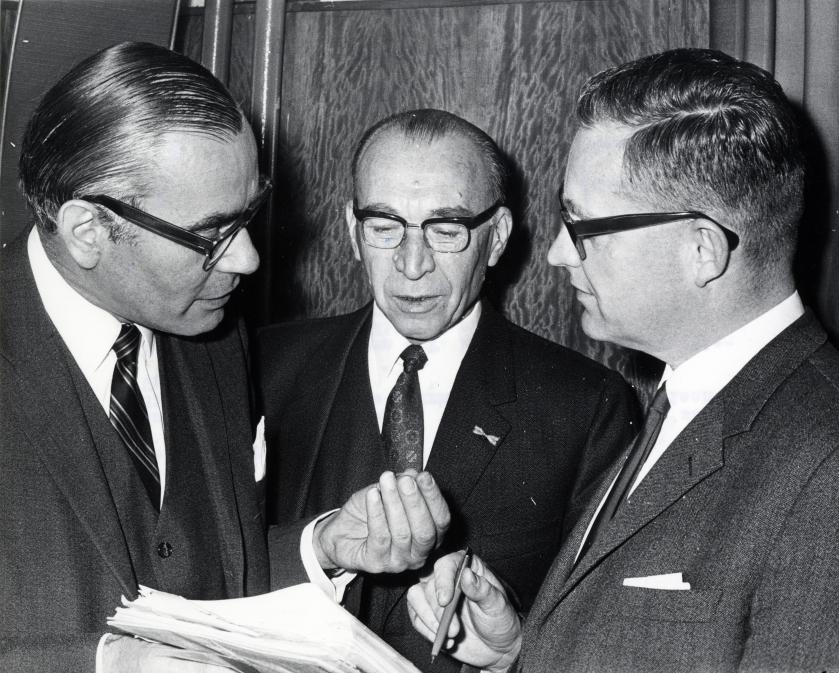 Kikkert, H. (CHU). H. Kikkert (midden) tijdens een vergadering van de Unieraad van de CHU, in het gebouw van de K. en W. in Utrecht. Geflankeerd door fractievoorzitter J.T. Mellema (links) en W. Scholten (rechts). Nederland, Utrecht, 15 november 1969.